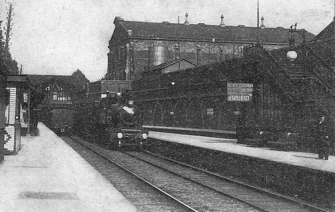 Gare de la Chapelle-Saint-Denis (Paris 18e) - Petite Ceinture